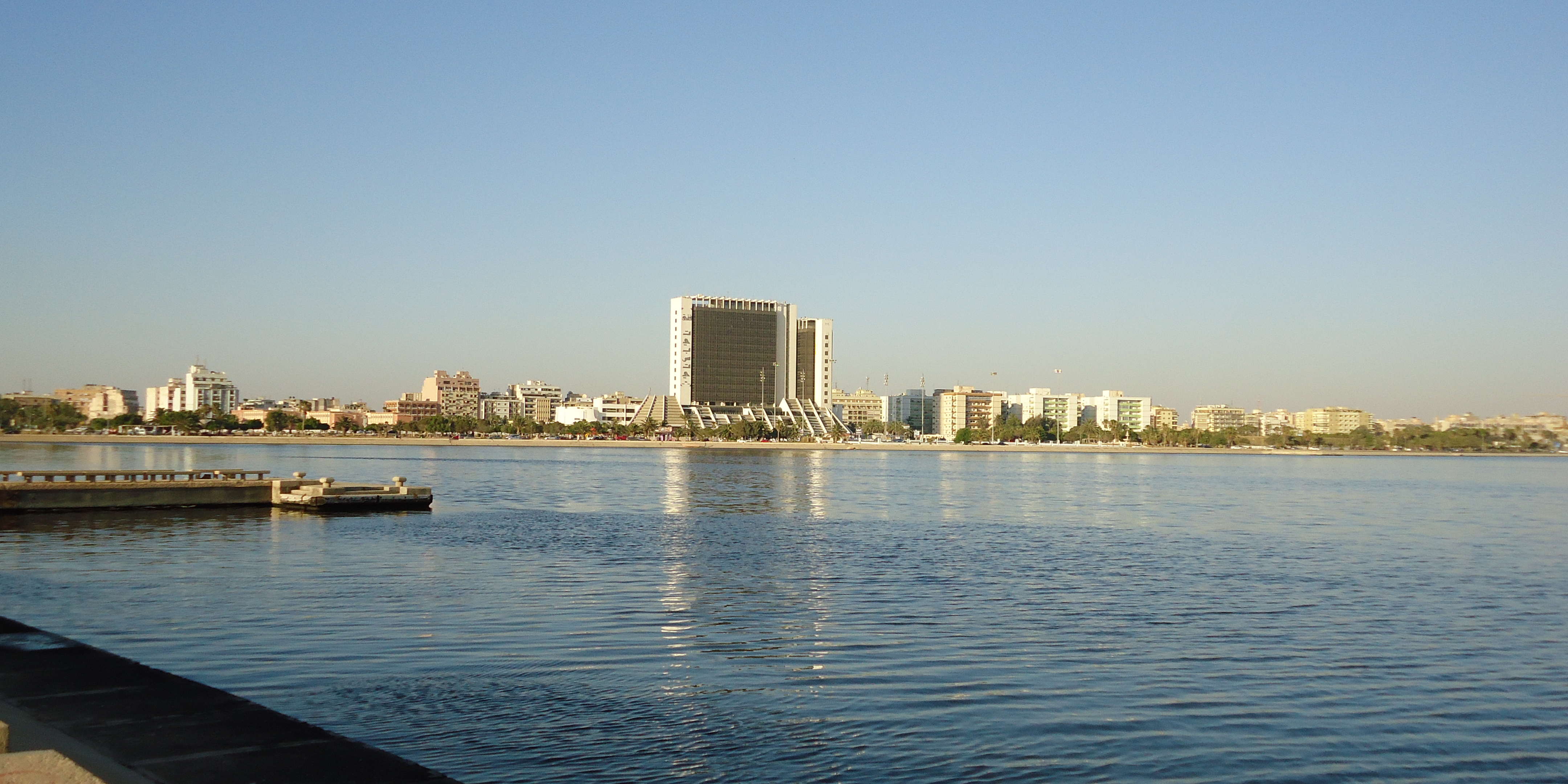 فندق تبستي